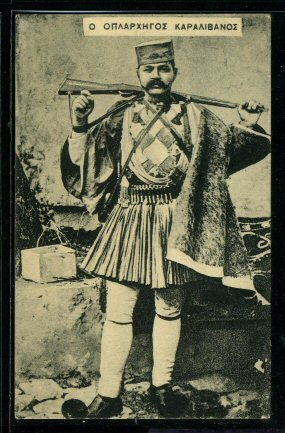 Гръцкият андартски капитан Алексис Караливанос.